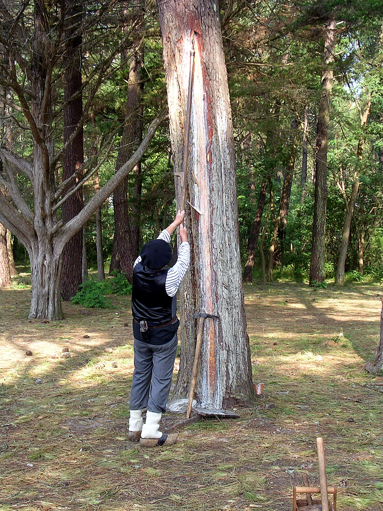 Gemmage à Mimizan (Landes, France)